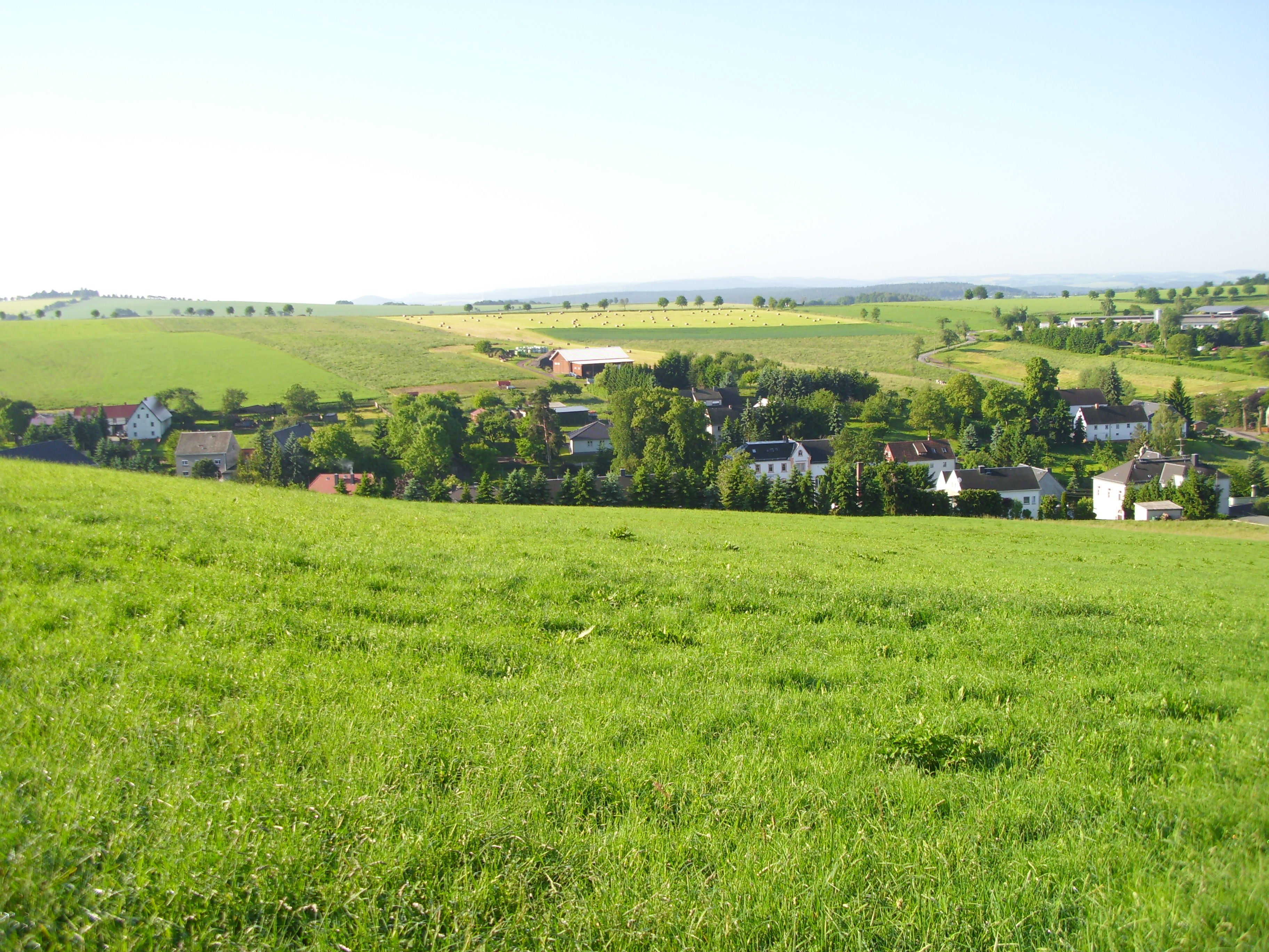 Blick auf das Mittel und Oberdorf von Obernaundorf mit Schule und Gasthaus.